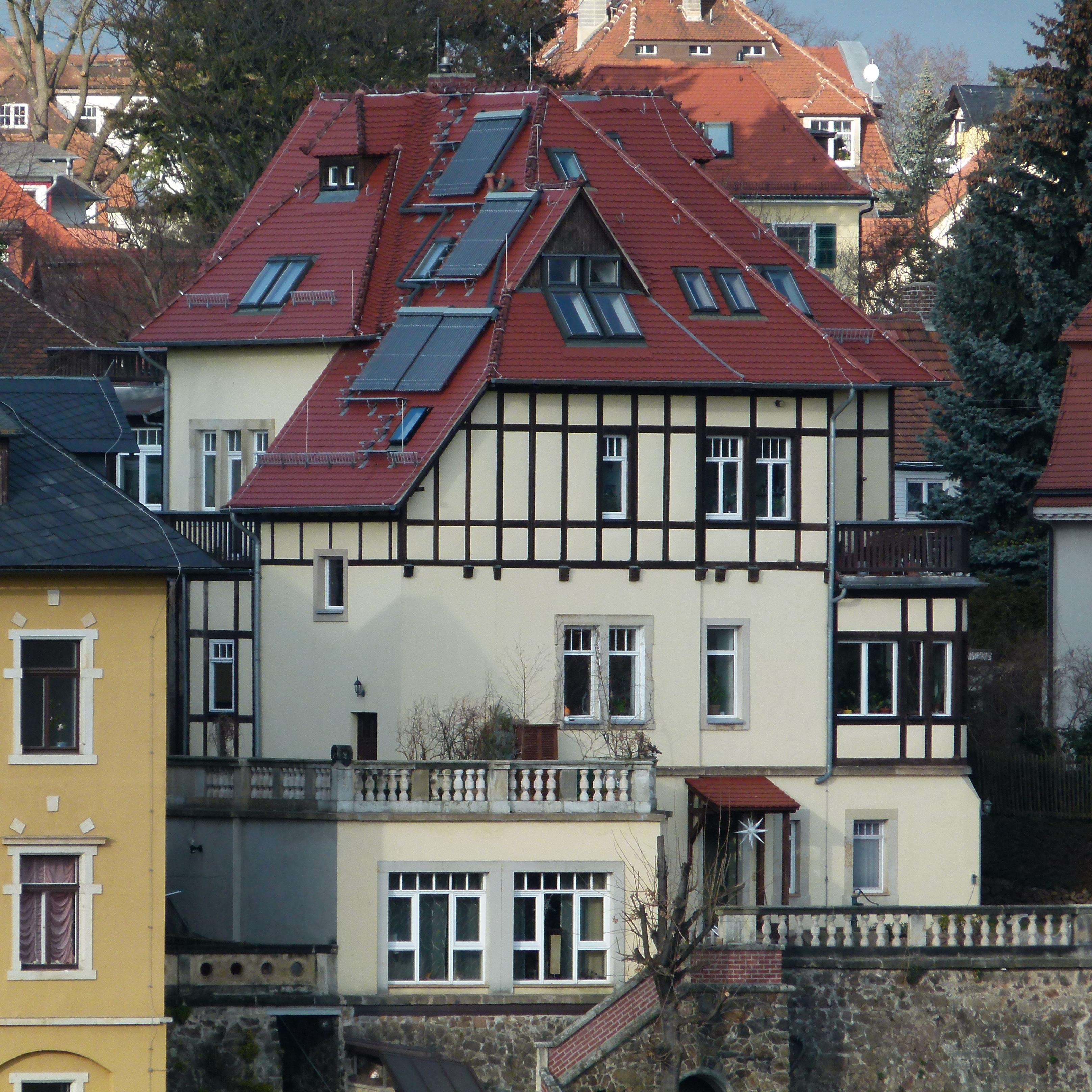 Denkmalgeschütztes Haus, An der Berglehne 4, Loschwitz, Dresden